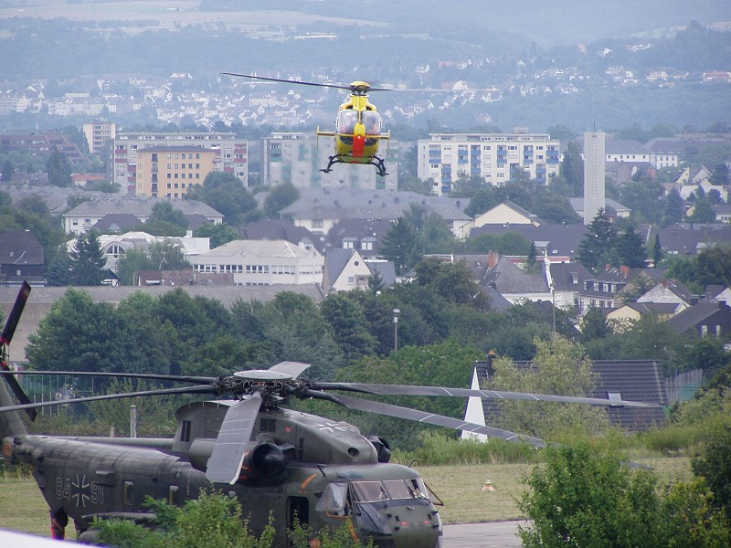 CHR 23 und GRTH